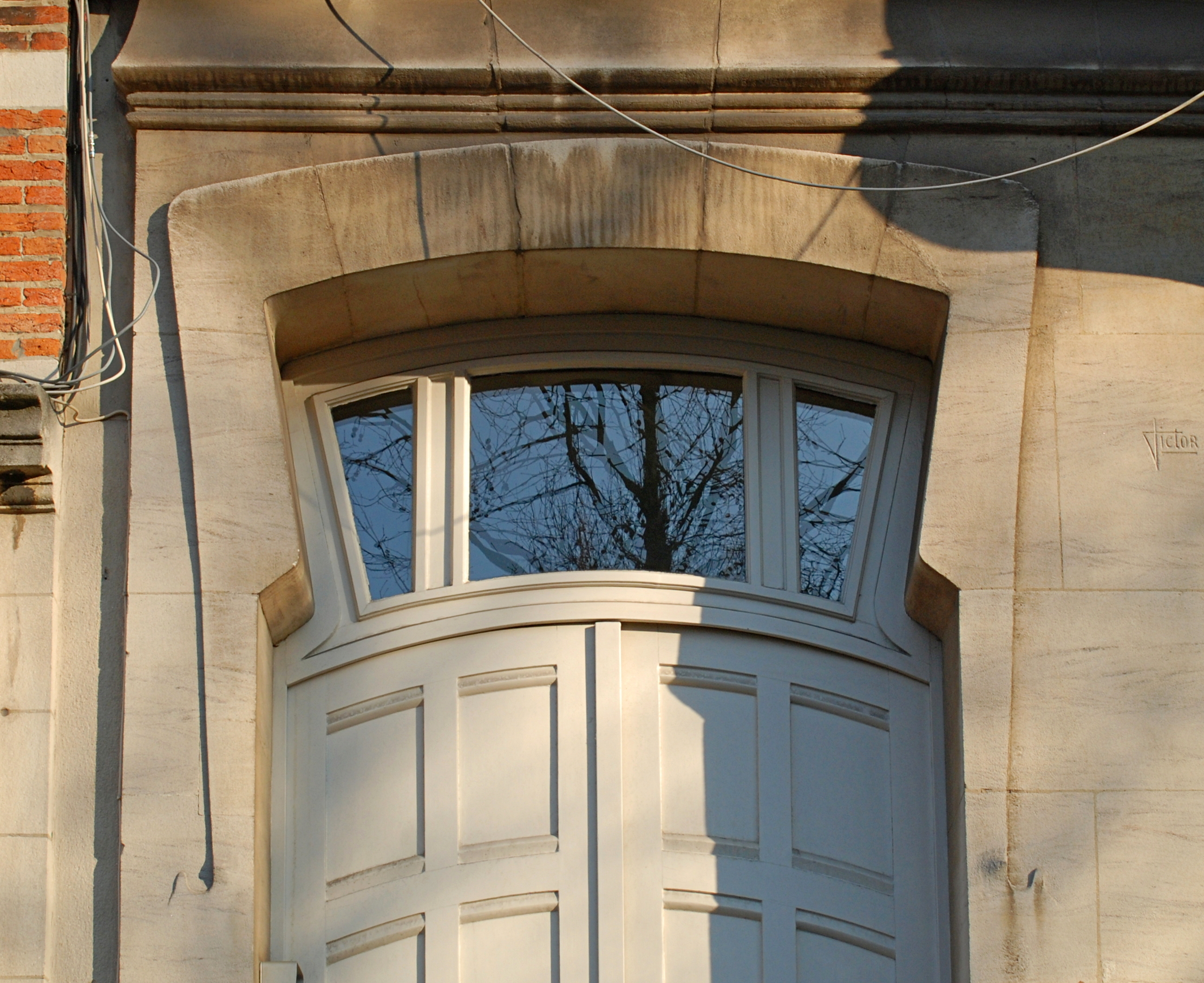 Belgique - Bruxelles - Villa Elisa (Art nouveau, architecte Victor Taelemans, 1899)